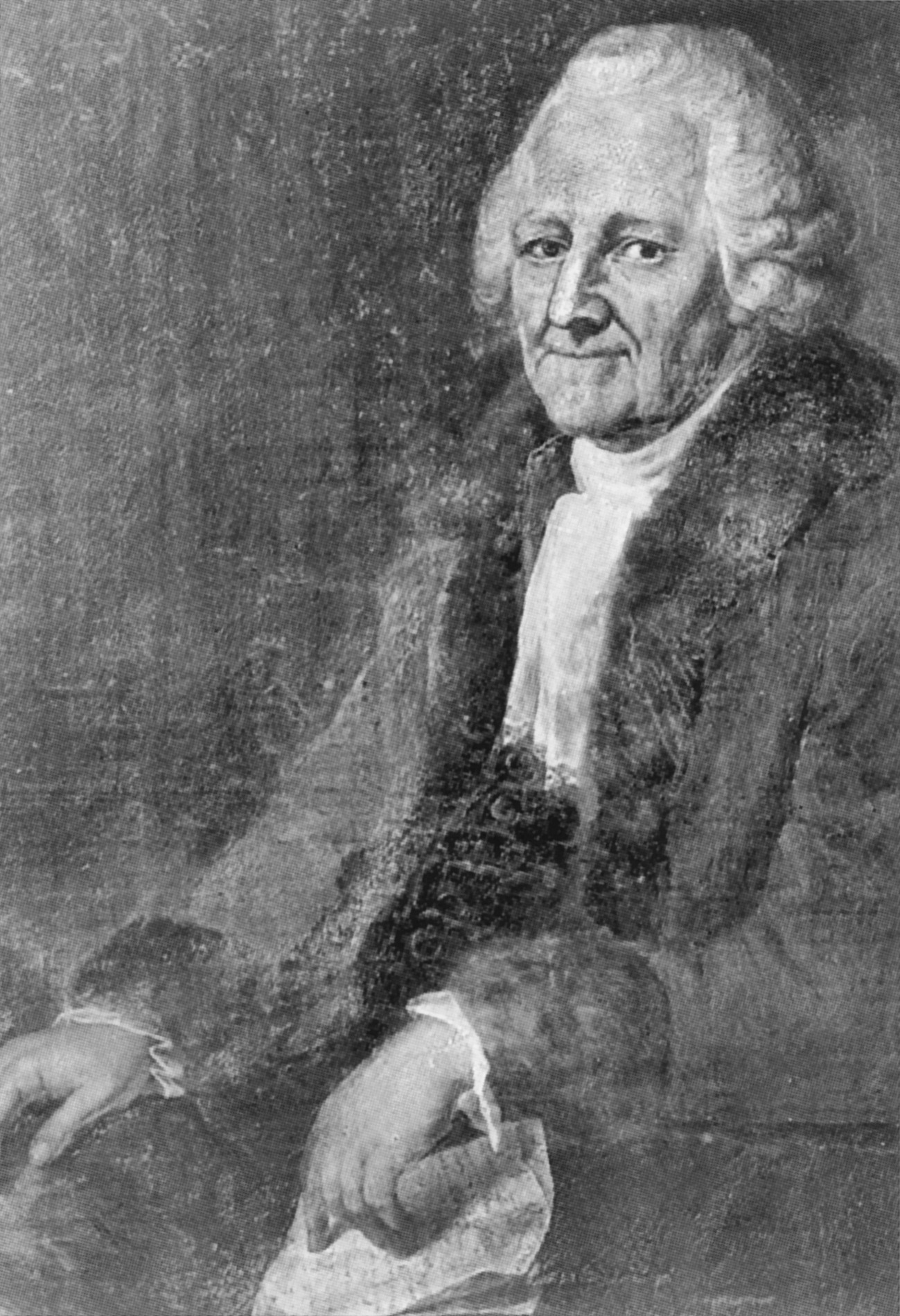 Porträt Friedrich von der Leyens (1701-1778)